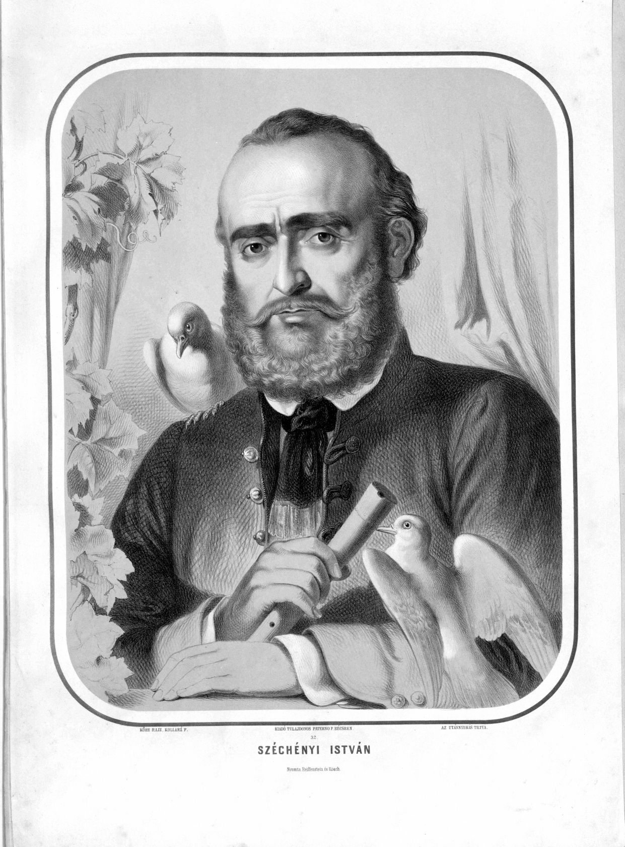 Széchenyi István időskori portréja